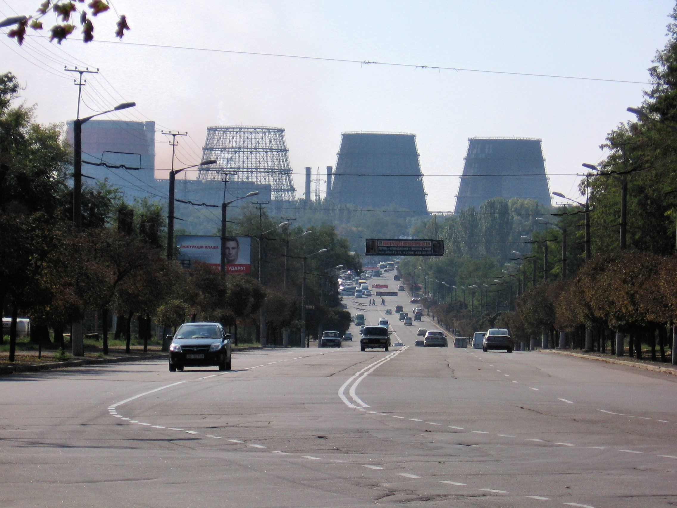 Класичний вид на градирні Криворіжсталі з проспекту Металургів